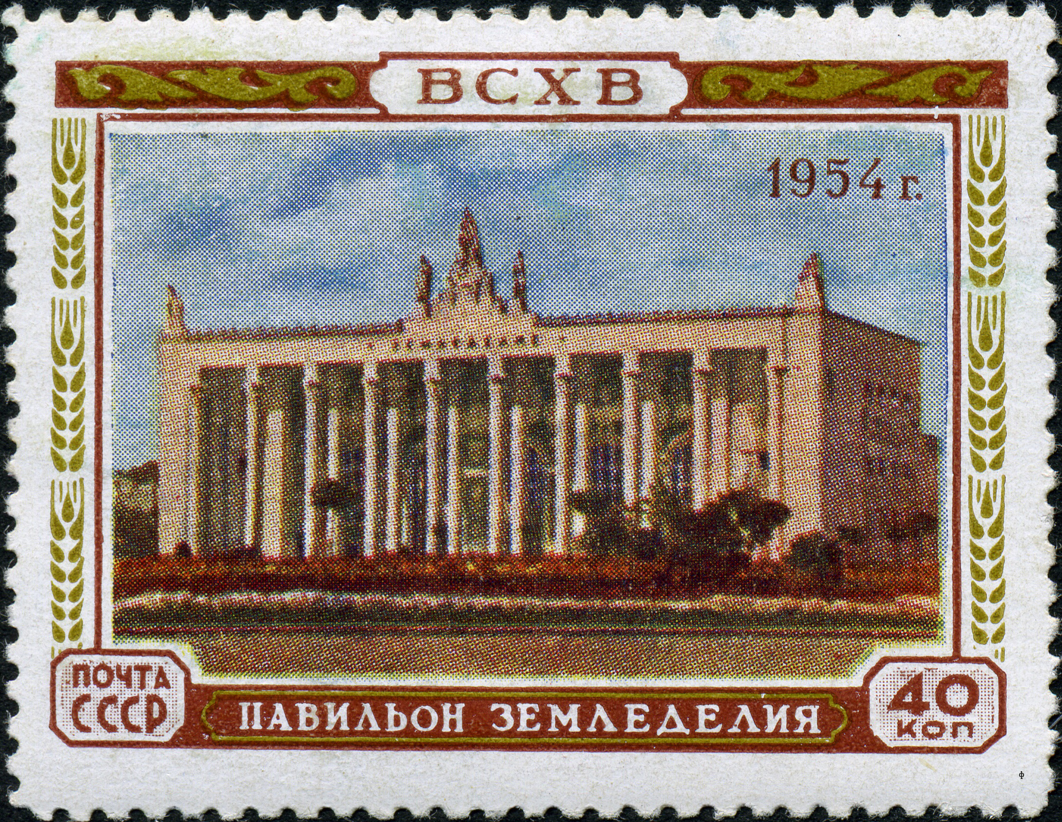 Марка СССР